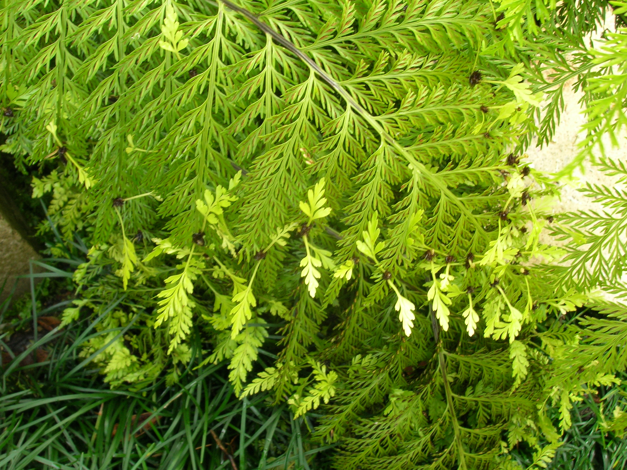 Asplenium bulbiferum Polypodiaceae i103005 159